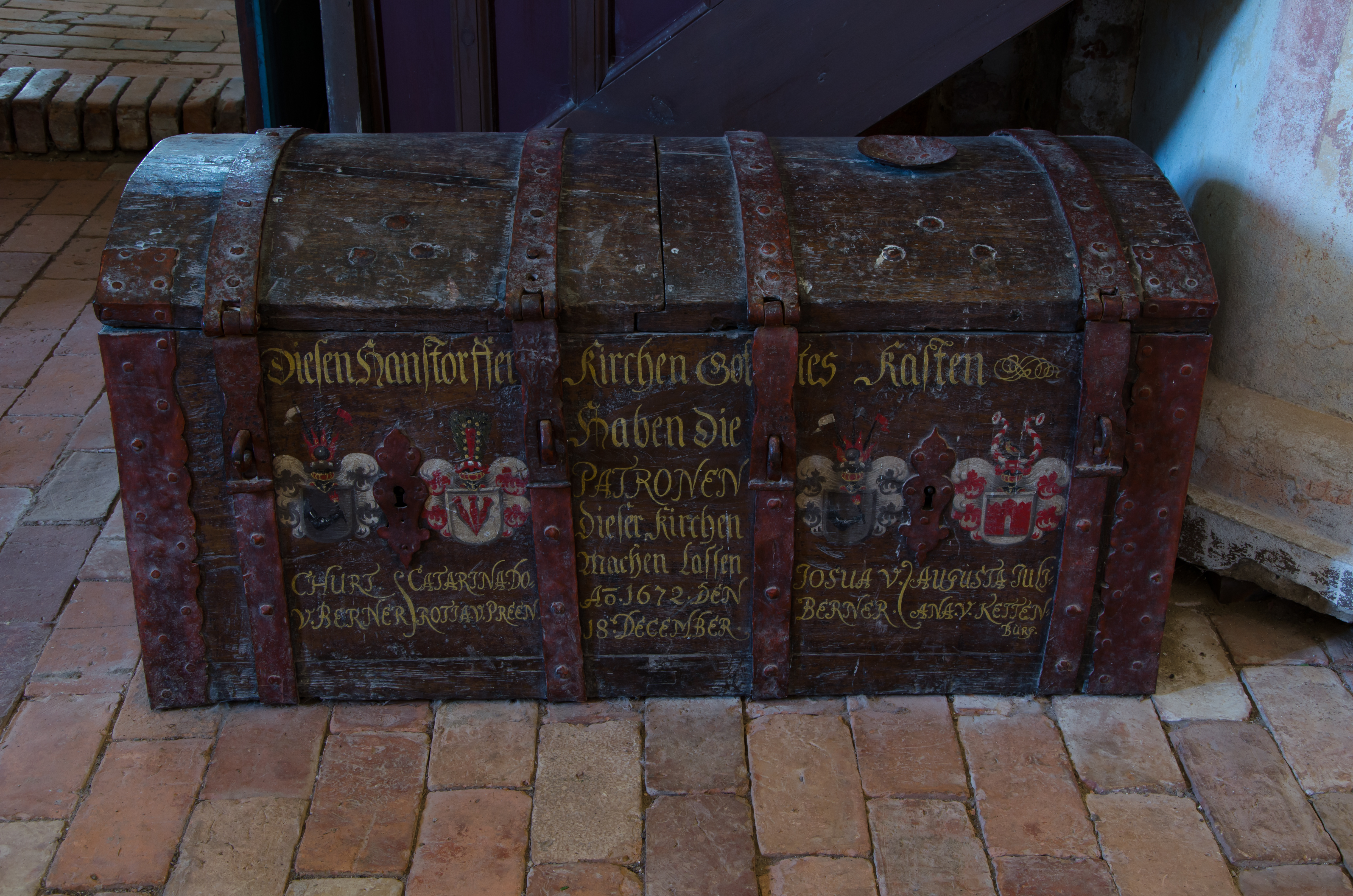 Hanstorf Kirche Gotteskasten